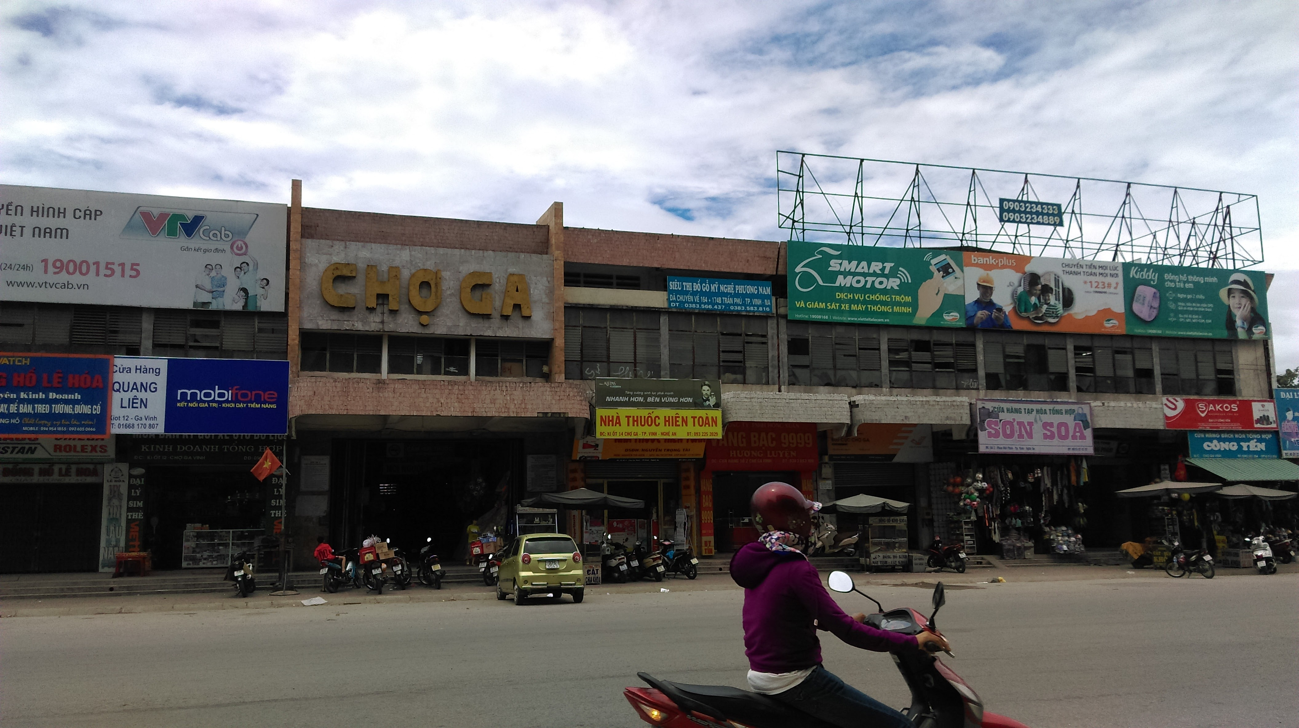 Chợ Ga, Vinh